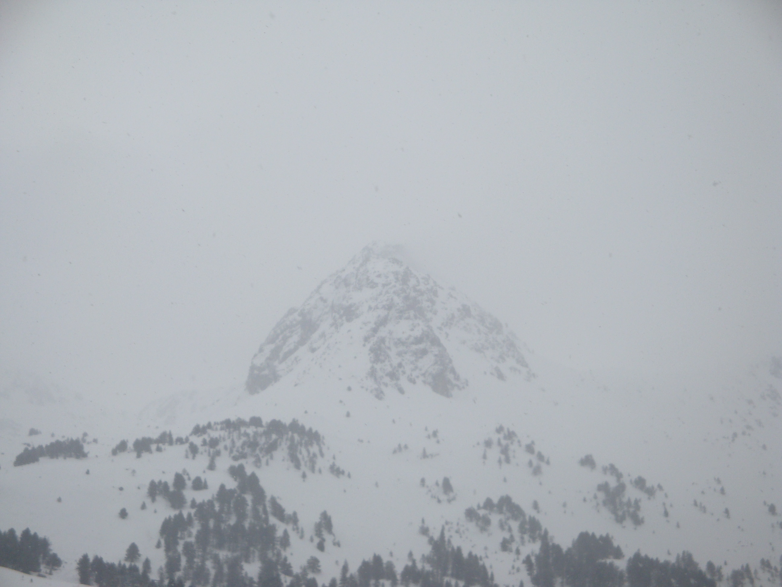 Montaña andorrana